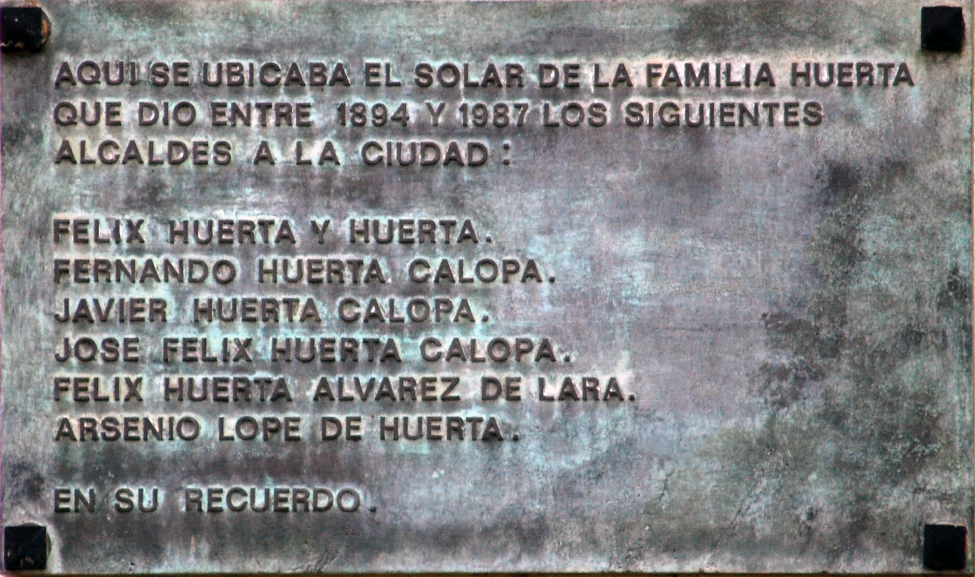 Placa de bronce en recuerdo de los alcaldes que ha dado la Familia Huerta a la ciudad de Alcalá de Henares (Comunidad de Madrid - España)